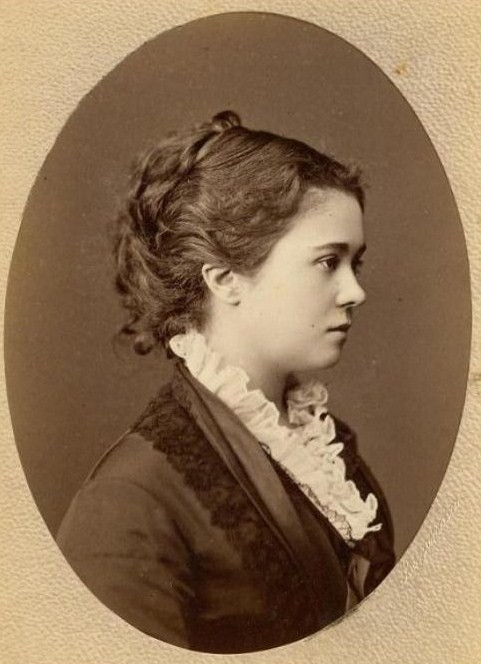 Графиня Анастасия Григорьева Орлова-Денисова, ур. кн. Гагарина (1853—1876)